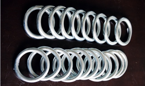 photo des anneaux du ziran men